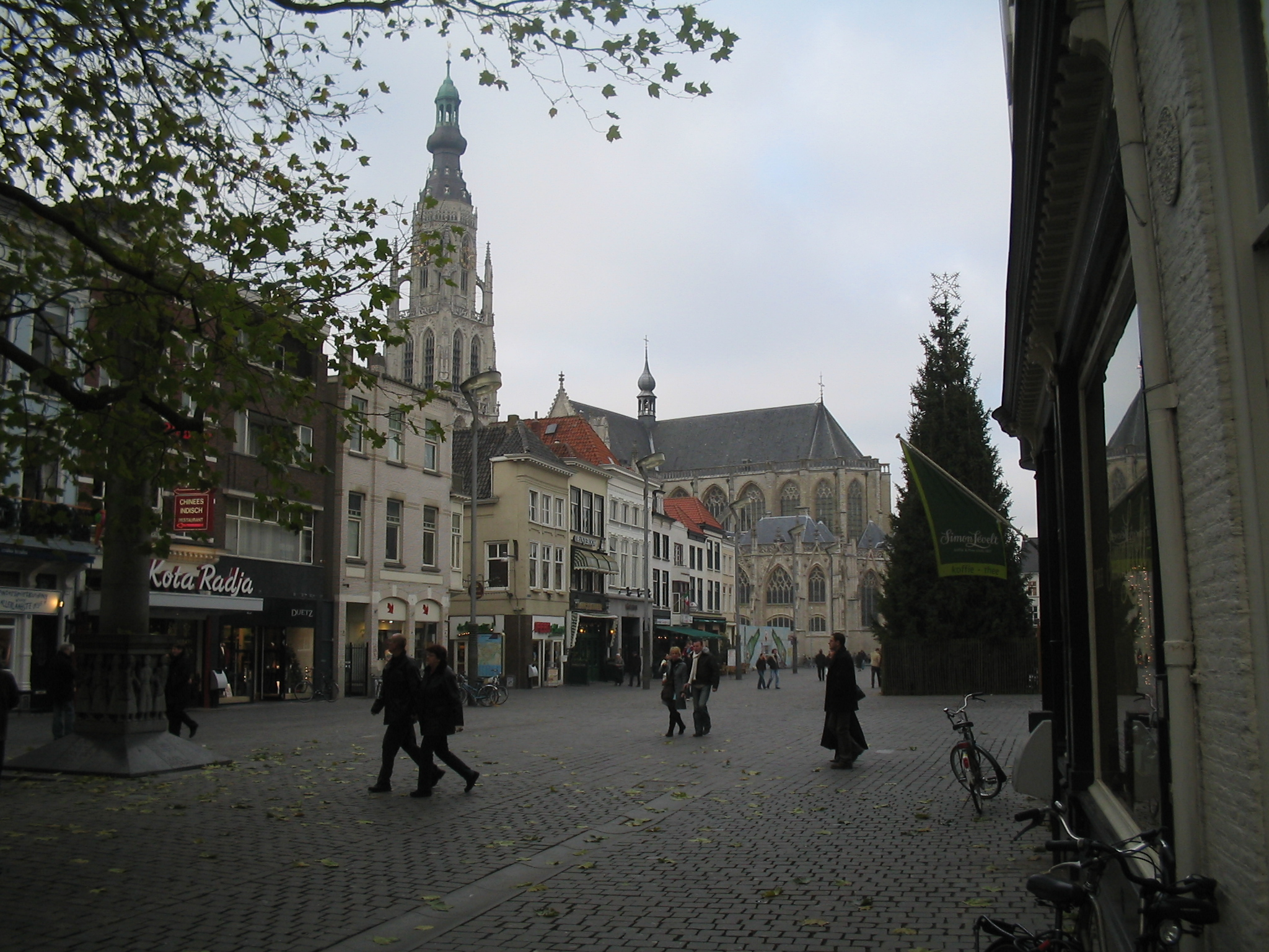 Breda , Grote Markt, dec. 2005